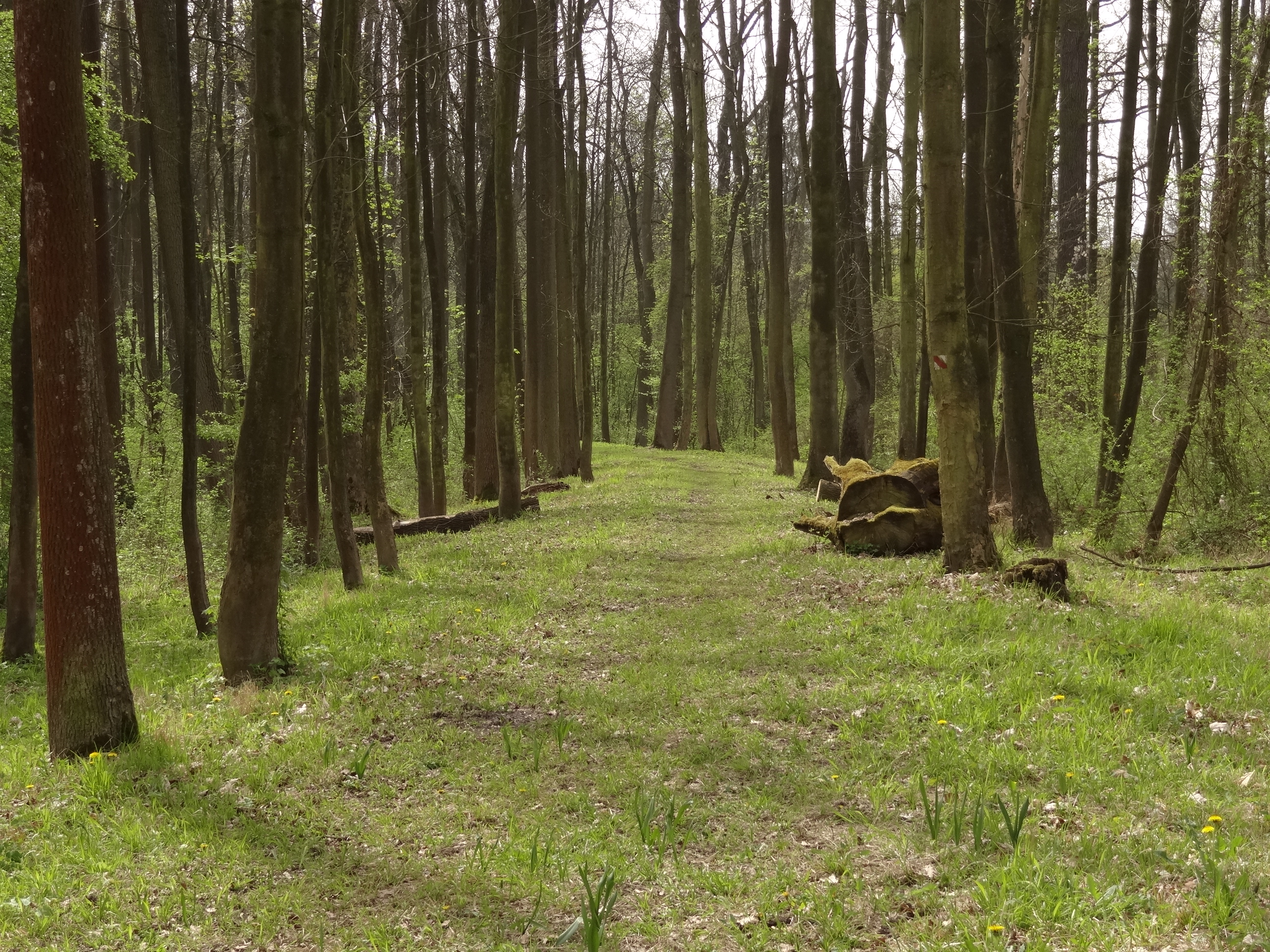 PP Zámecký park Liblice